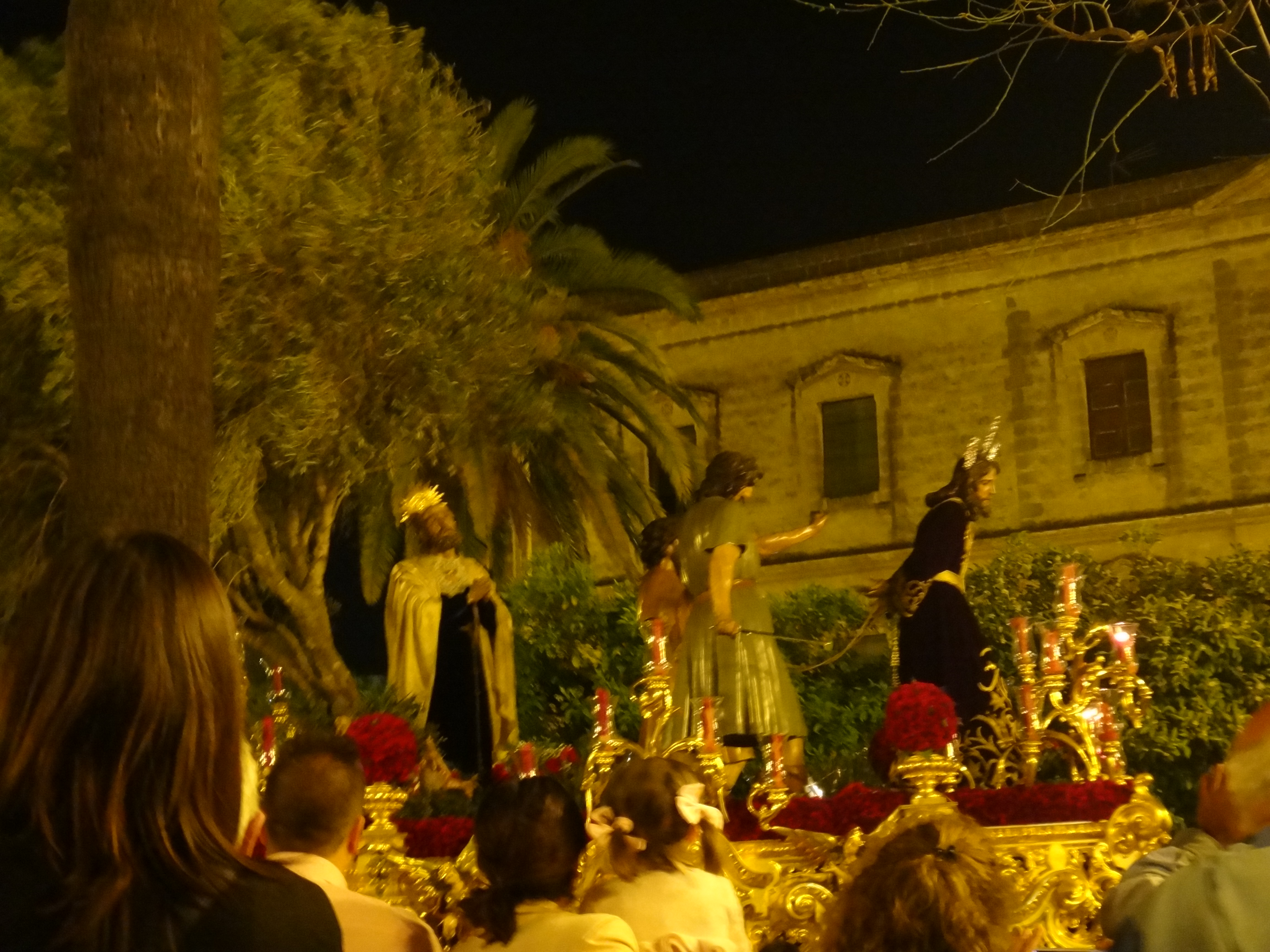 El Prendimiento. Semana Santa de Jerez de la Frontera 2015 (Andalucía, España)